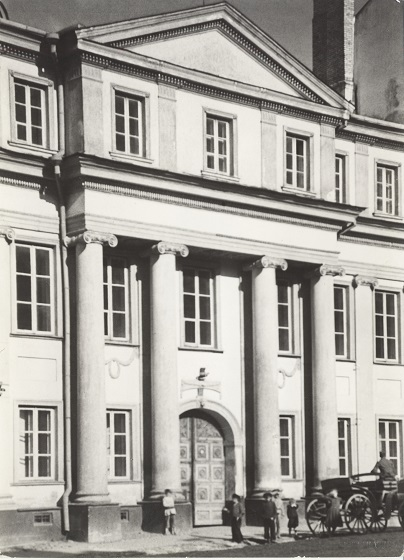 Беларуская (тарашкевіца): Вільня (Vilnia), вуліца Вялікая (vulica Vialikaja), палац Абрамовічаў (Abramovič)